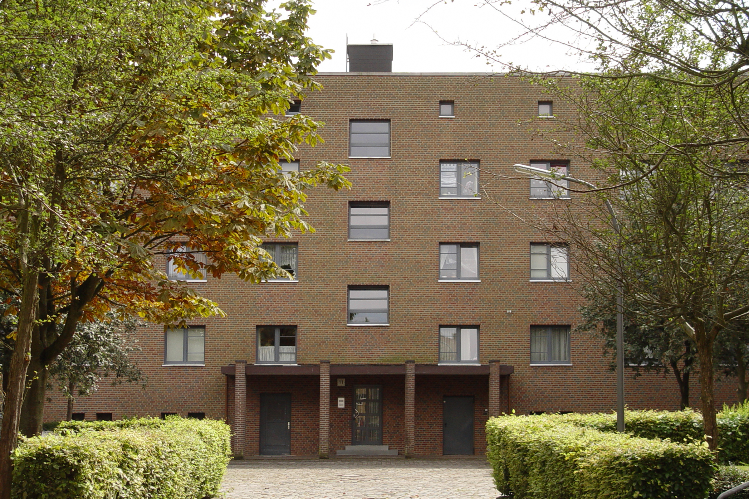 Hamburg, Bezirk Harburg, Stadtteil Eißendorf, Adolf-von-Elm-Hof 11,1928/1929, Teil des denkmalgeschützten Ensembles 31208 (Adolf-von-Elm-Hof/Mehringweg)This is a photograph of an architectural monument.